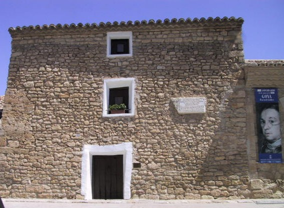 Dem Goya séi Gebuertshaus.